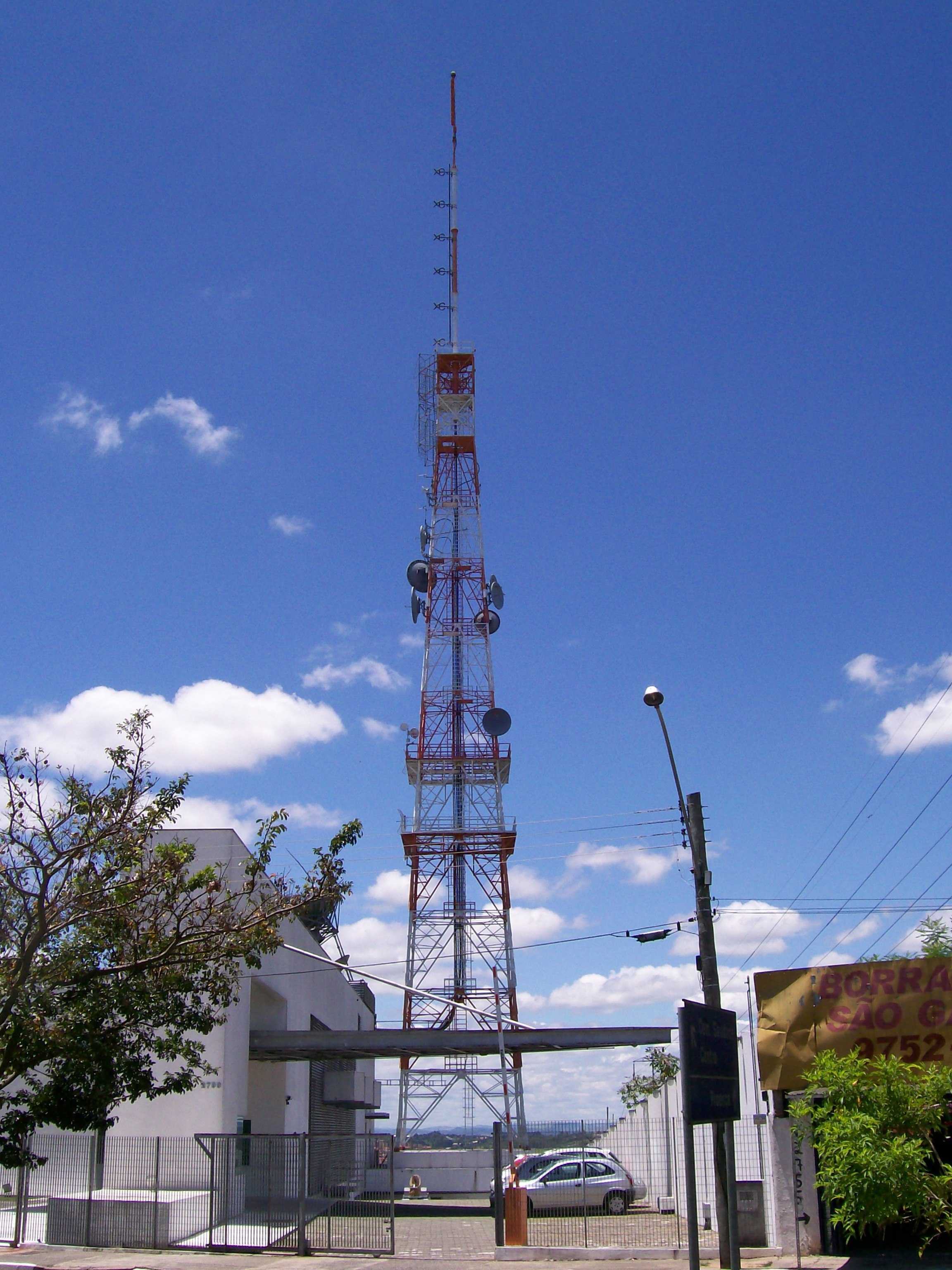 Antena da TV Bandeirantes Campinas e das rádios Educadora FM, Bandeirantes AM e BandNews FM.